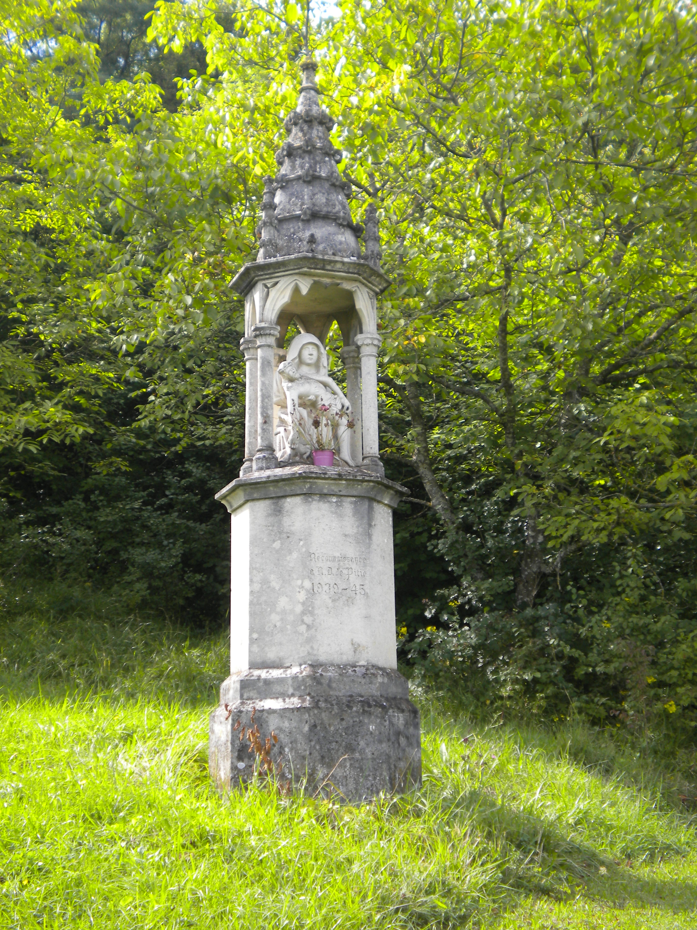 Photographie d'une pietà et son monument néogothique, sculptés dans la première moitié du XXe s, sis Rue du Bois-la-Dame (ancienne Rue Haute), à l'orée du Bois-Brûlé, à Bulligny, Meurthe-et-Moselle, Lorraine, France. Inscription du socle : "Reconnaissance à Notre-Dame de Pitié 1939-45".